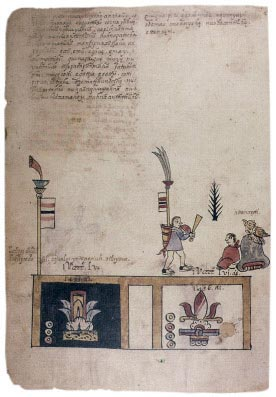 Página del Códice de Huichapan en la que se relatan los sucesos ocurritos en 1455, año 3 caña. La página posee una glosa en otomí en la parte superior. Sobre el cuadrete inferior izquierdo, una glosa en náhuatl indica que ese año ocurrió un eclipse de sol.